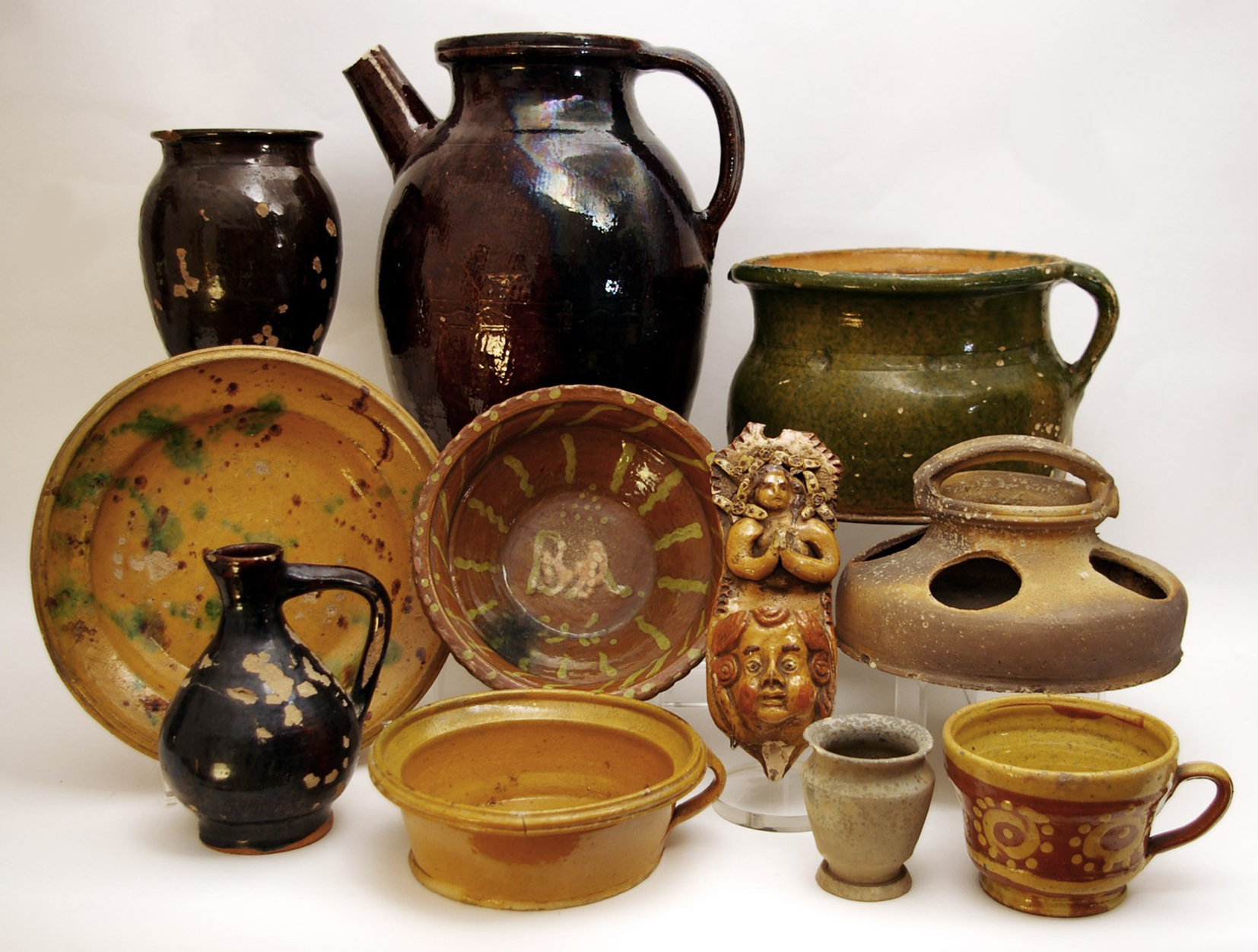 Hafnerkeramik aus der Gemeinde Kröning im Landkreis Landshut in Niederbayern